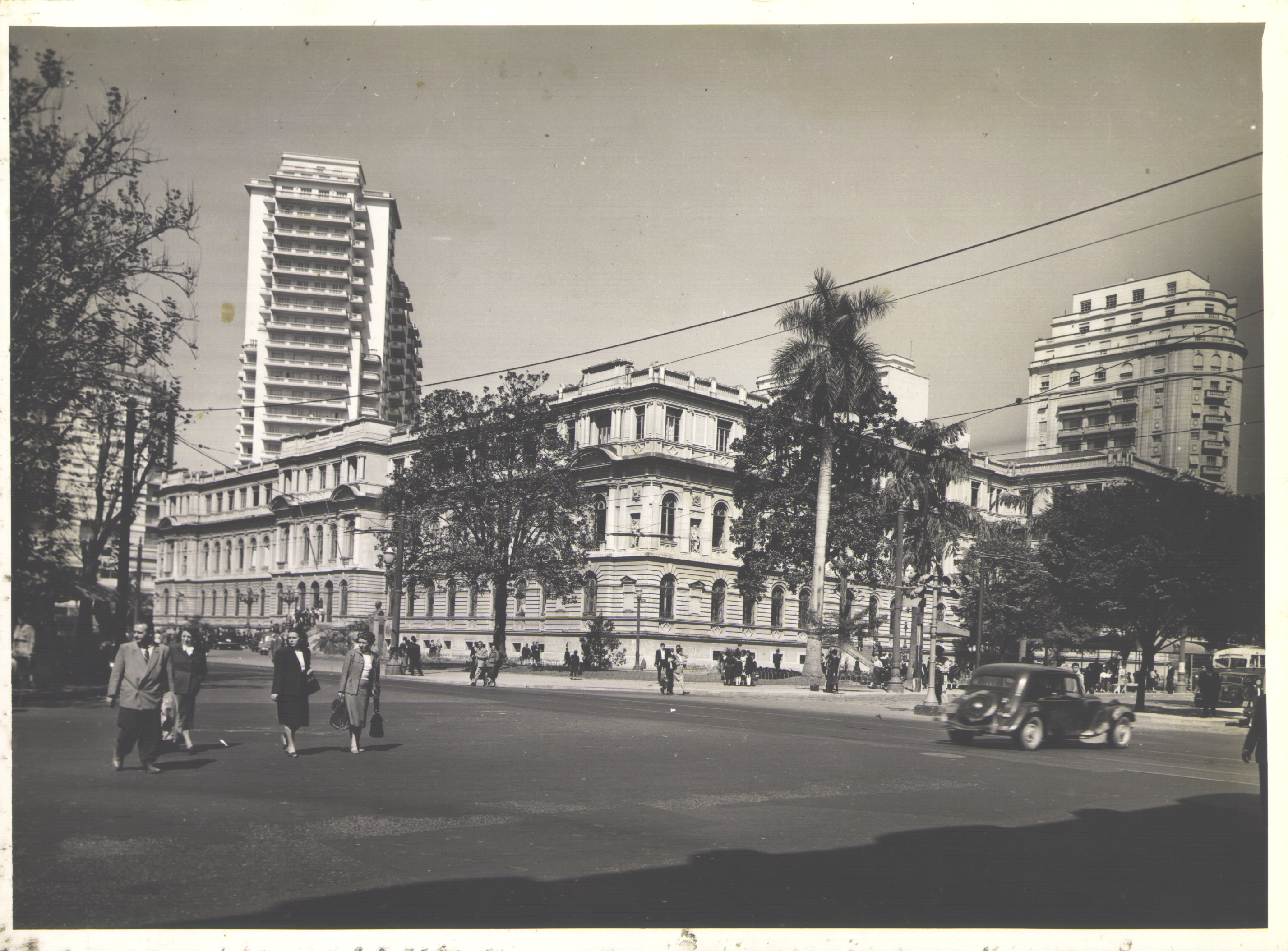 Obra que integra o acervo do Museu Paulista da USP. Coleção Werner Haberkorn